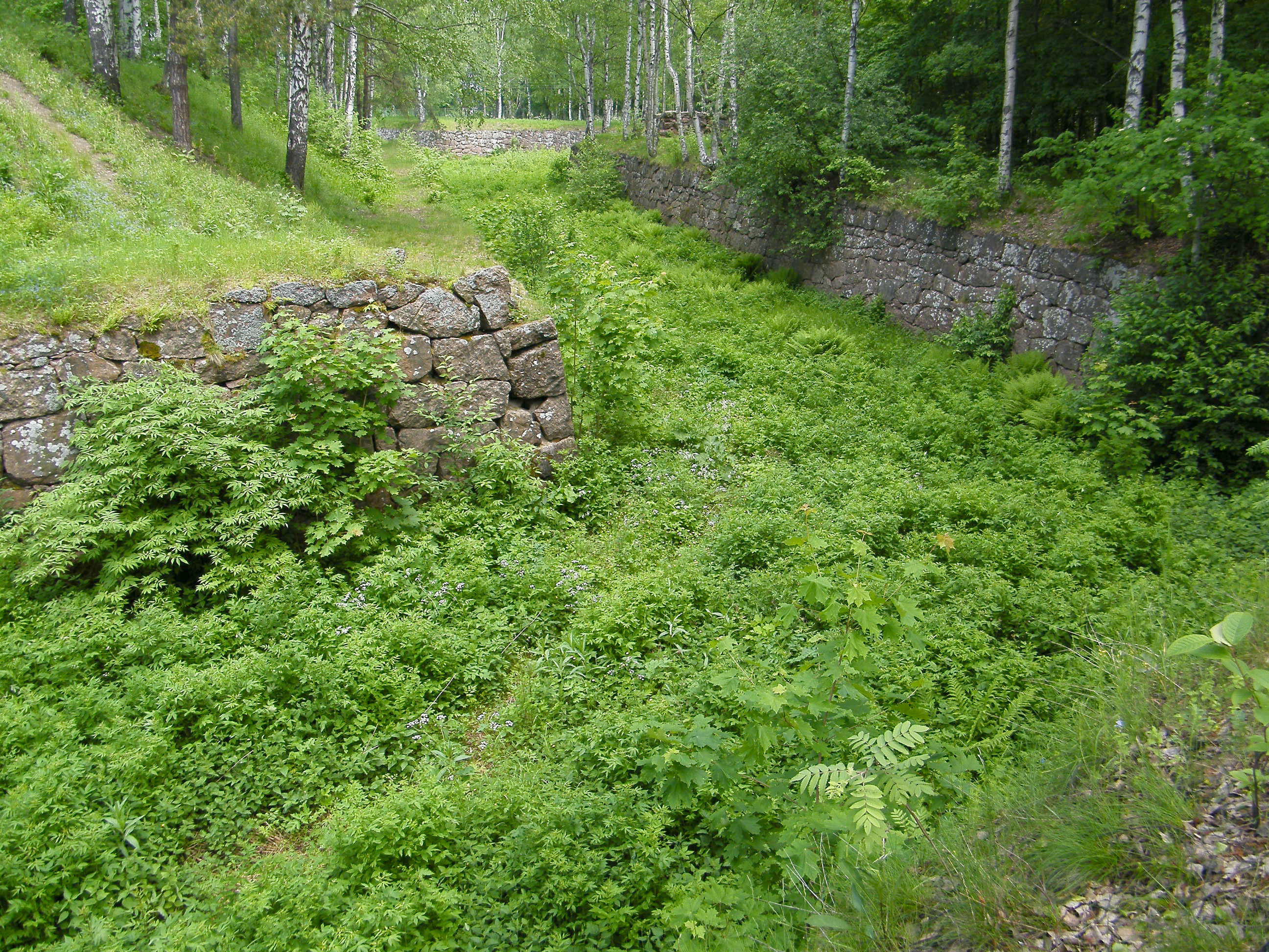 Остатки укреплений на Батарейной горе